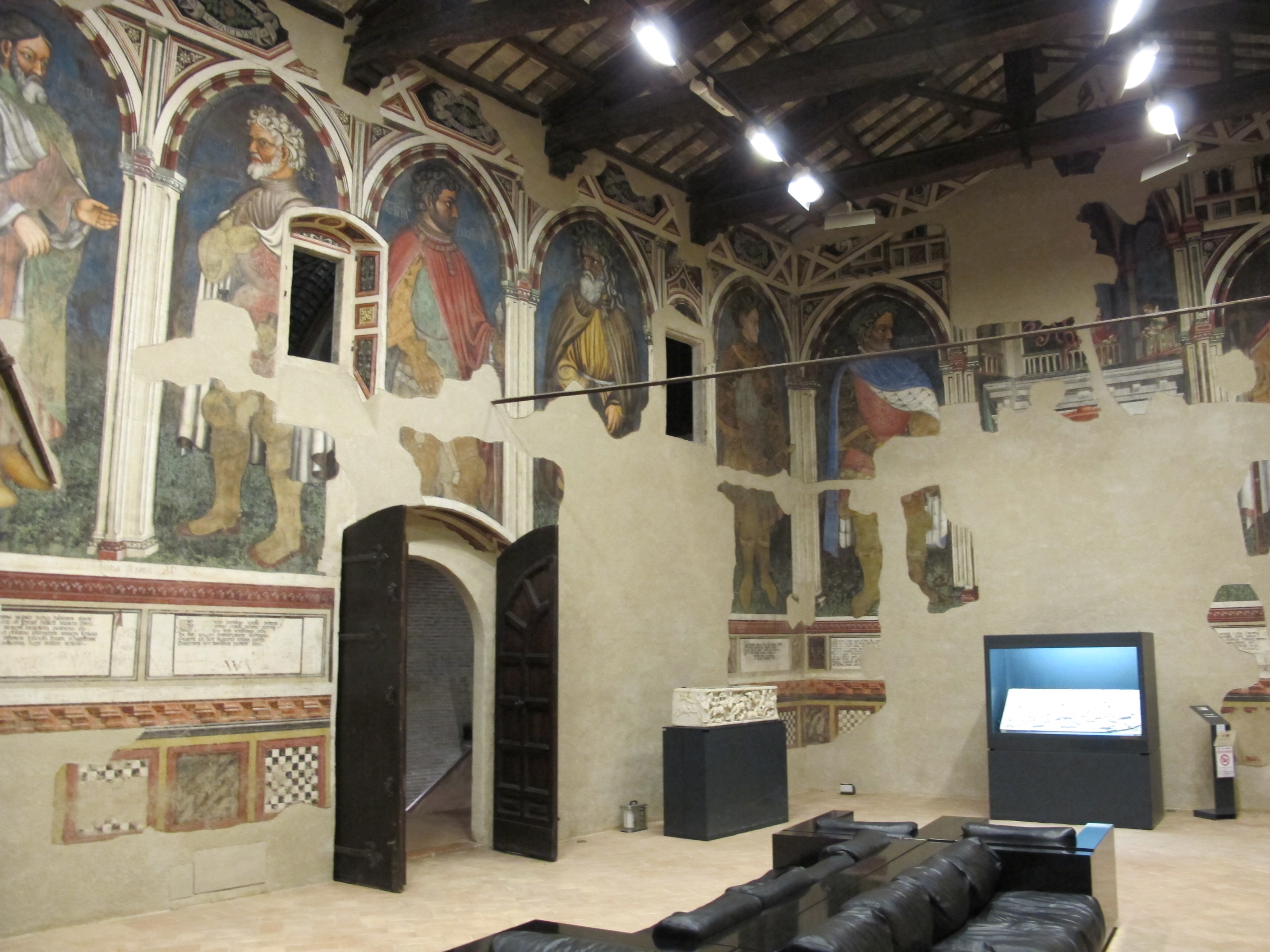 Palazo trinci, sala dei giganti (o degli imperatori)